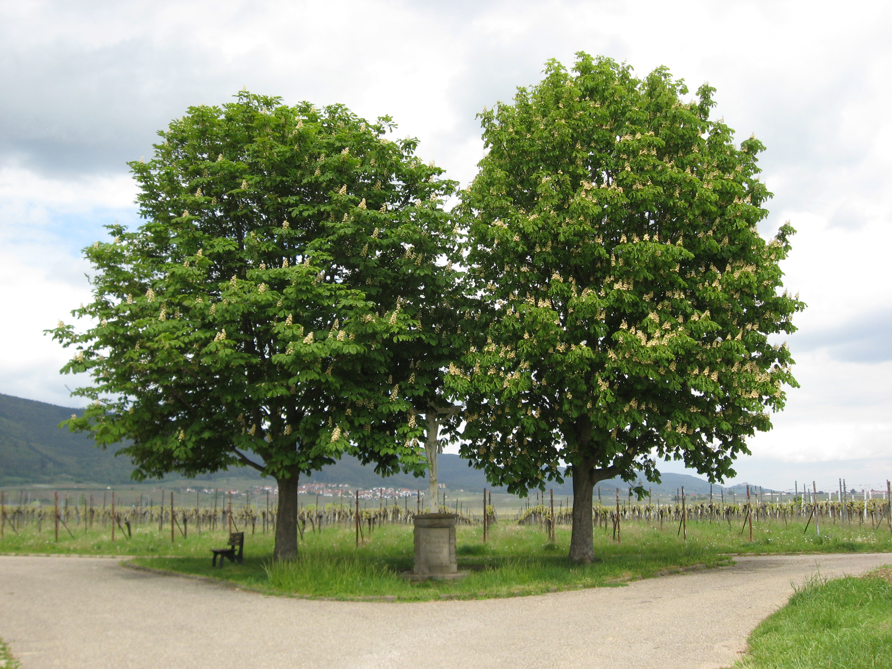 Feldkreuz mit Rosskastaniengruppe nördlich von Flemlingen, am Ende der Oberdorfstraße am Kirchweg